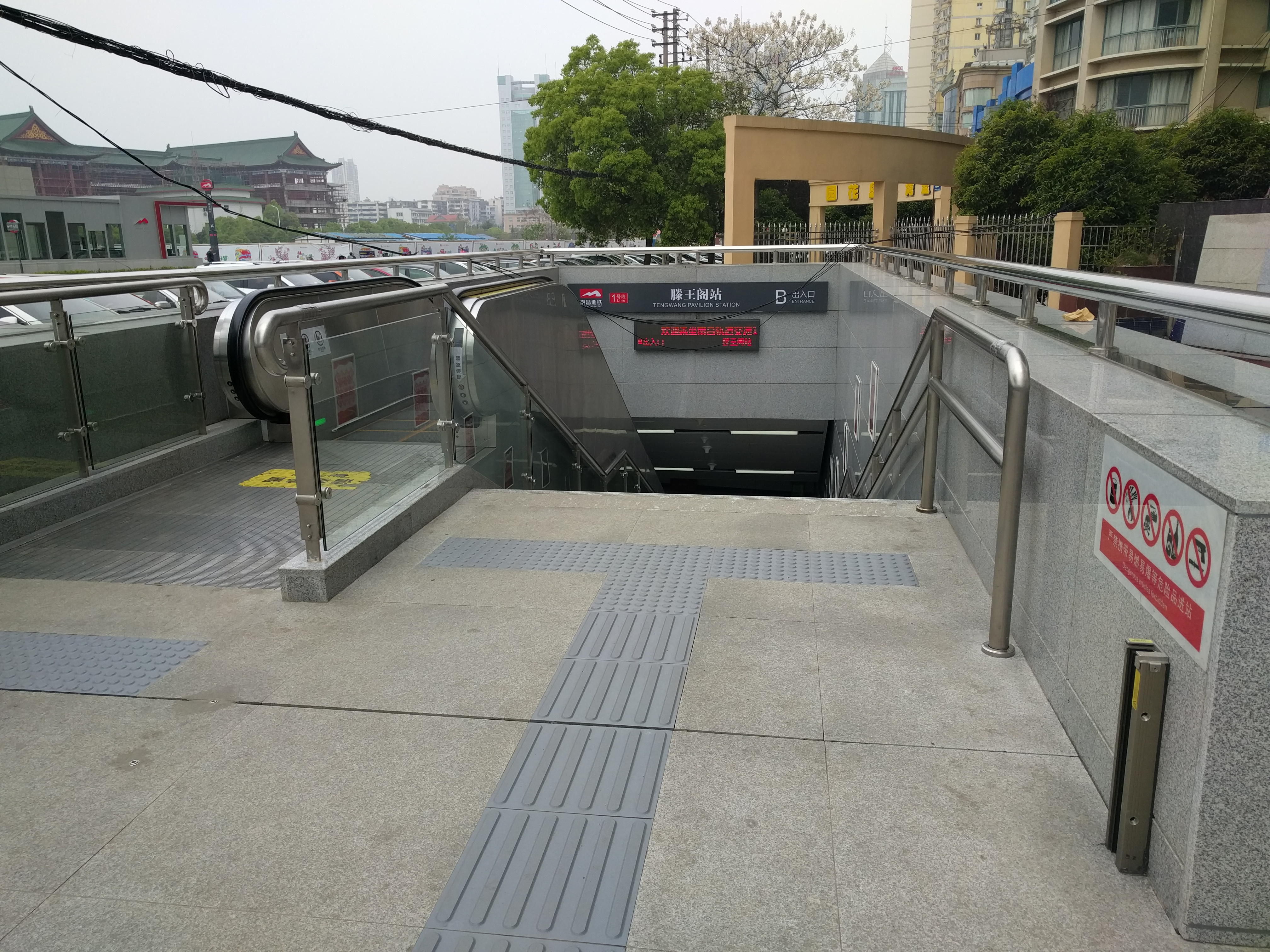 滕王阁站B出入口